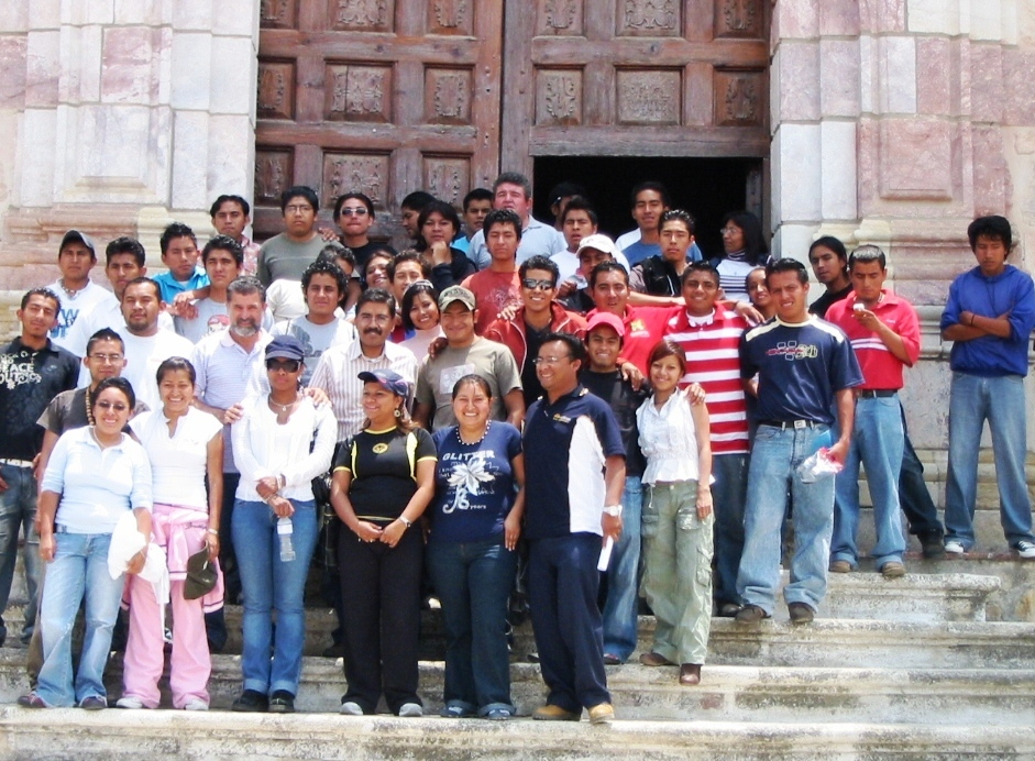 Trabajo comunal voluntario en comunidades